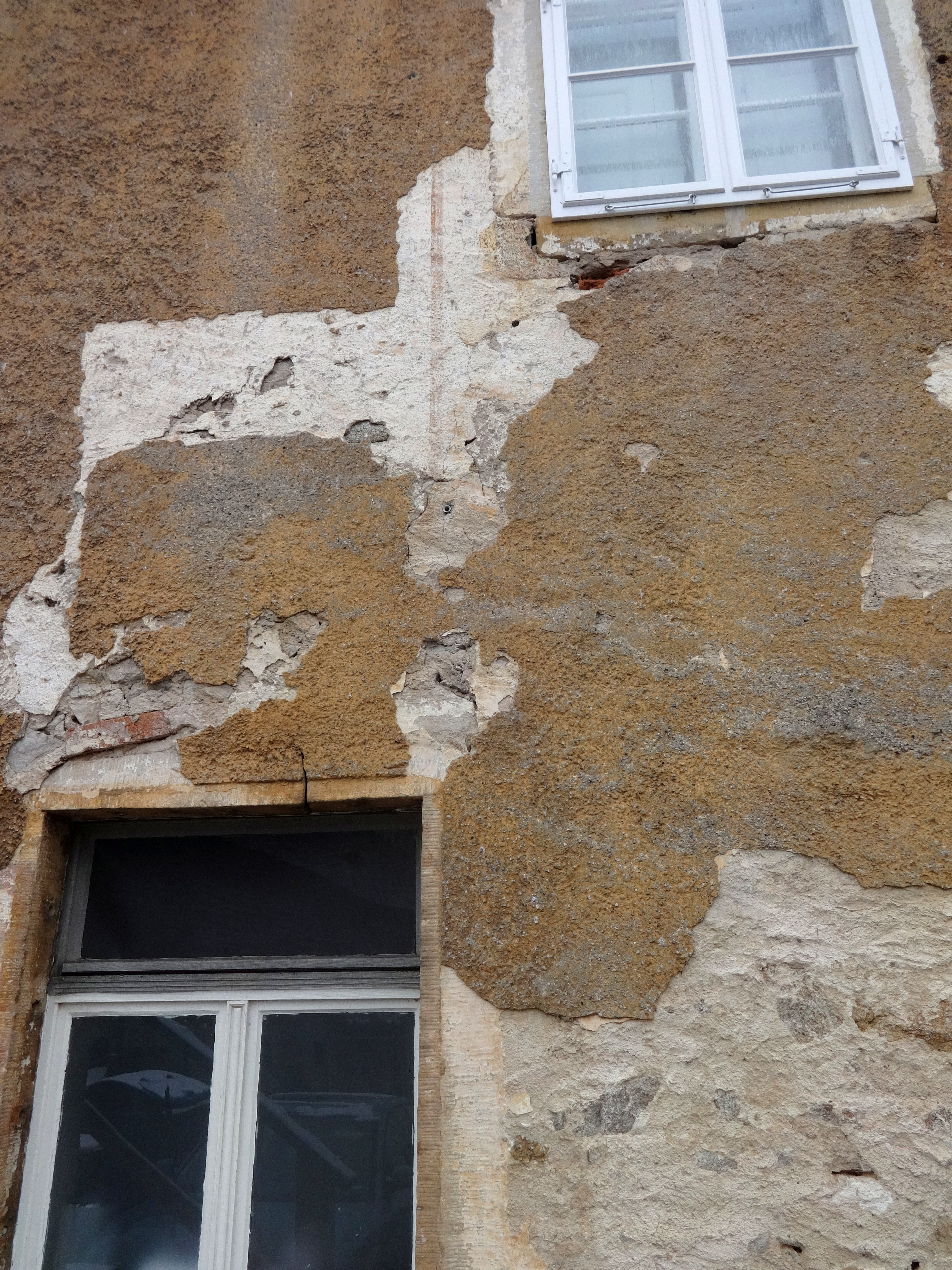 Rückseite des Marcolinihauses in Moritzburg mit Flächen zur Farbrekonstruktion (Detail)